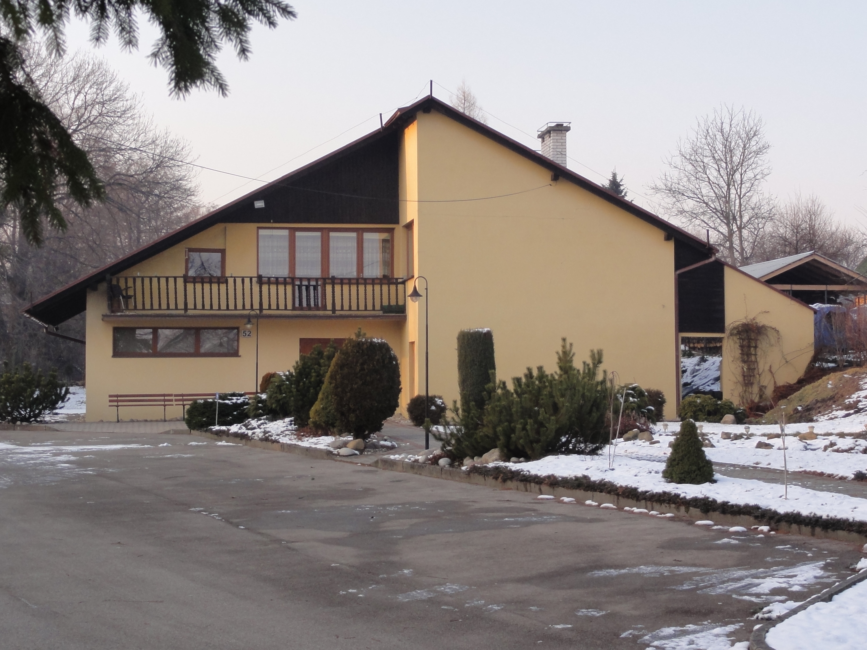 Sala Królestwa Świadków Jehowy przy ulicy Orzeszkowej w Cieszynie.